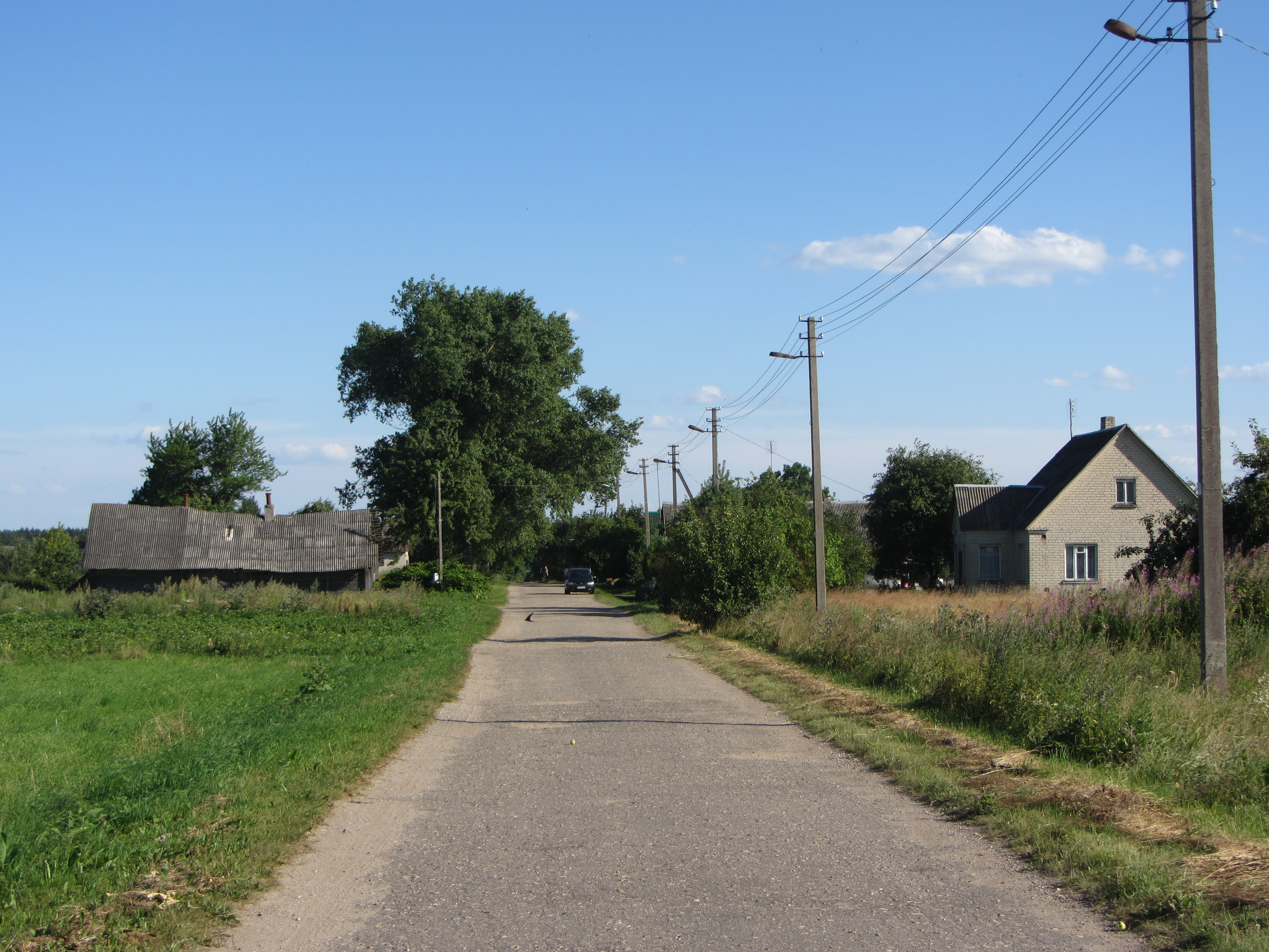 Gavėniai 19128, Lithuania